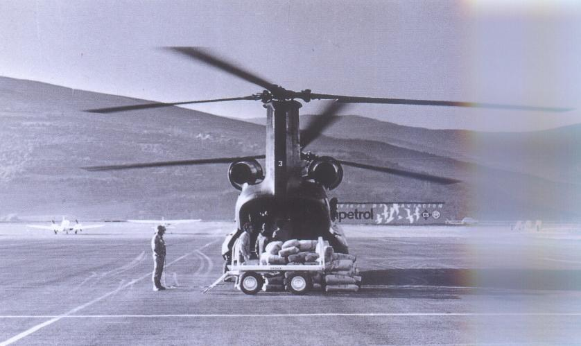 Aiguats del 1982. Un dels Xinos, un dels helicopters militars que van vetllar per l'abastiment de la població, descarregant farina a l'aeroport de la Seu d'Urgell.